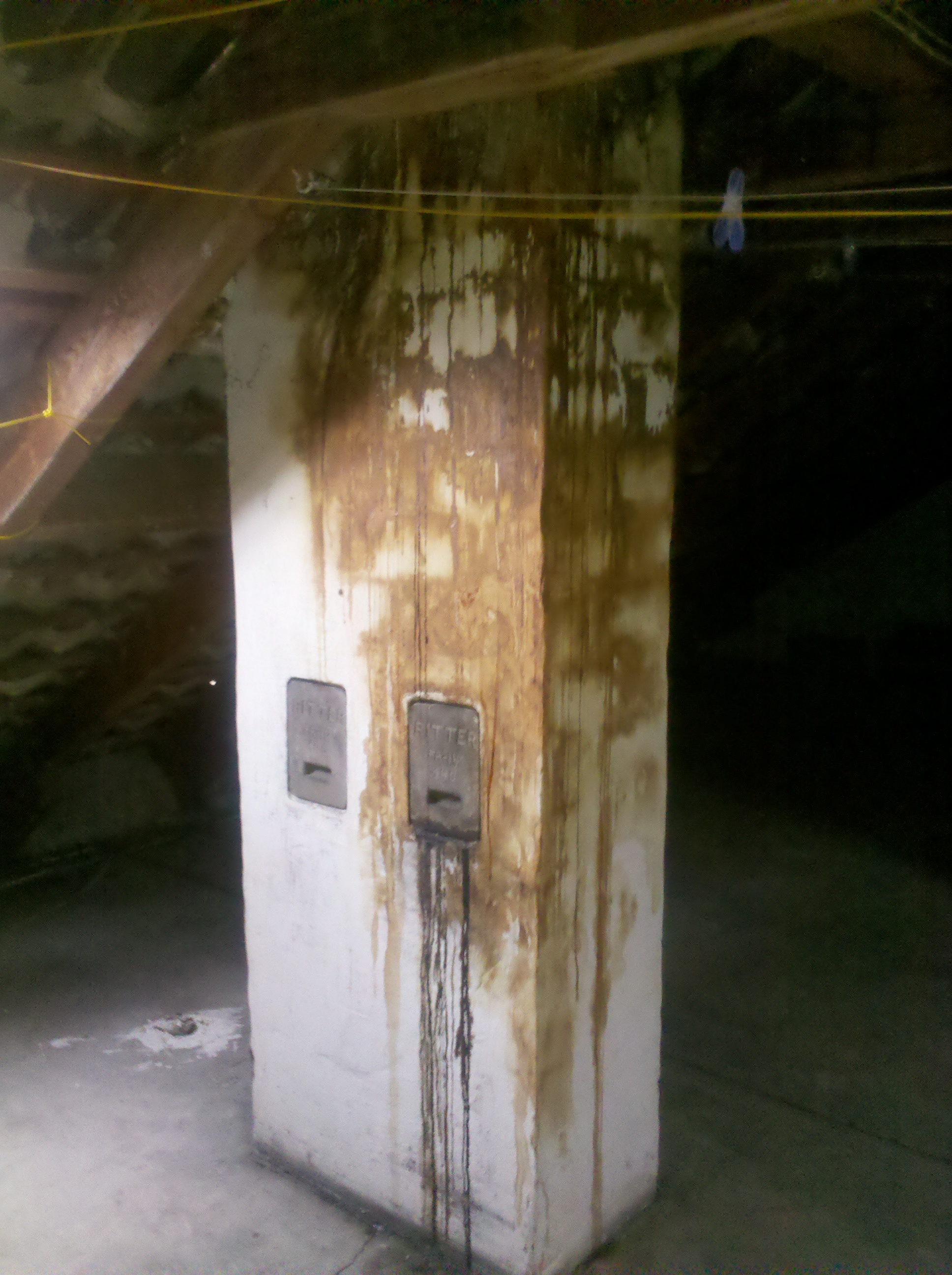 Ein durchnässter/ versotteter Schornstein im Dachboden eines Mehrfamilienhauses, an welchem mit Holz befeuerte Öfen angeschlossen sind.